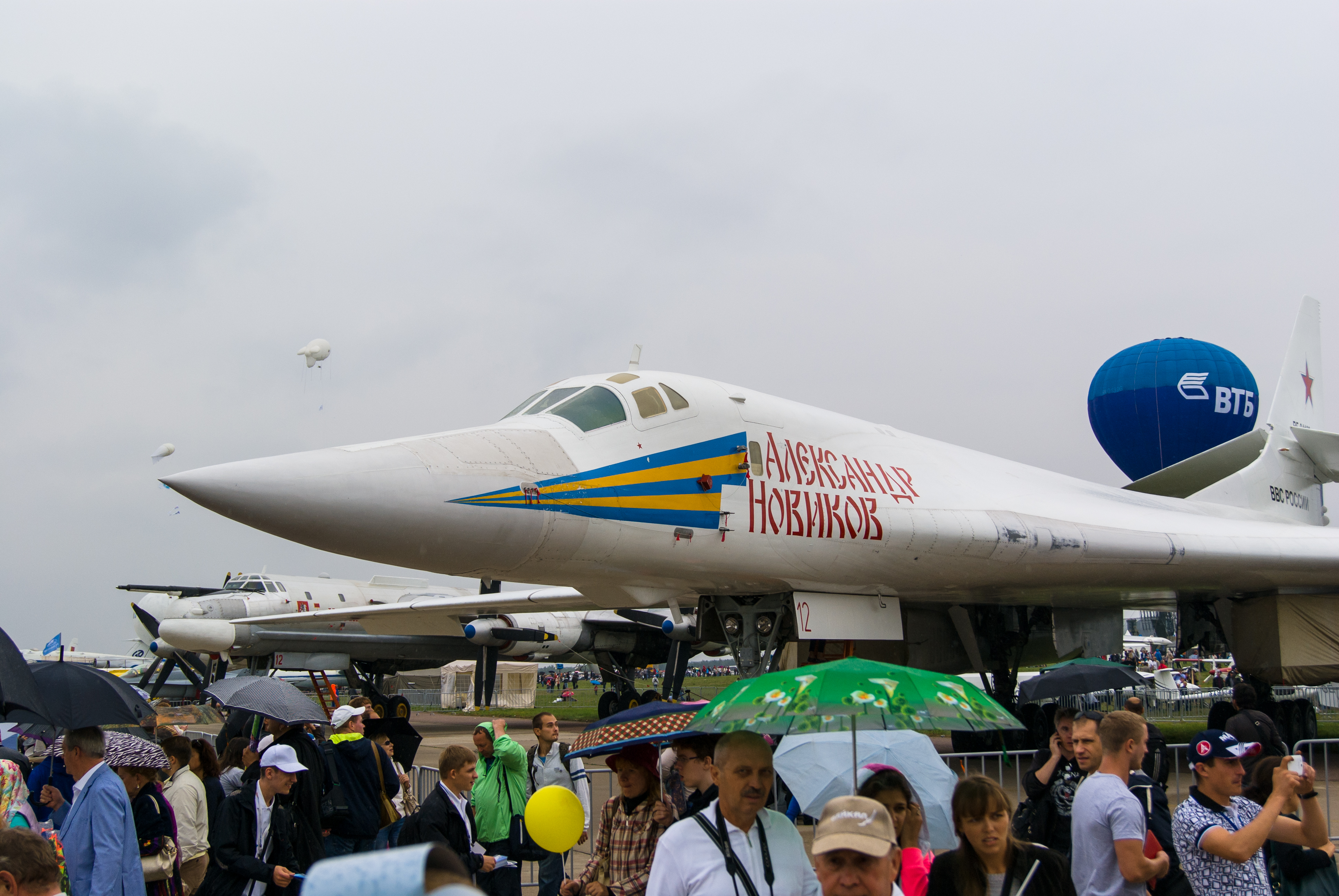 Стратегический бомбардировщик Ту-160 "Александр Новиков" на МАКС-2013